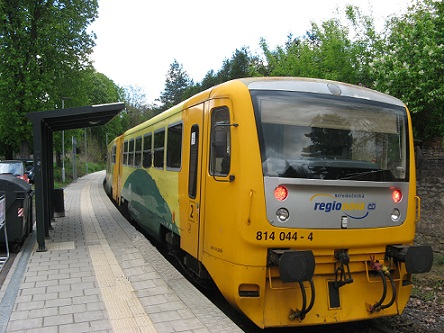 nová železniční zastávka Praha - Hlubočepy (od prosince 2015), v zastávce motorová jednotka 814/914